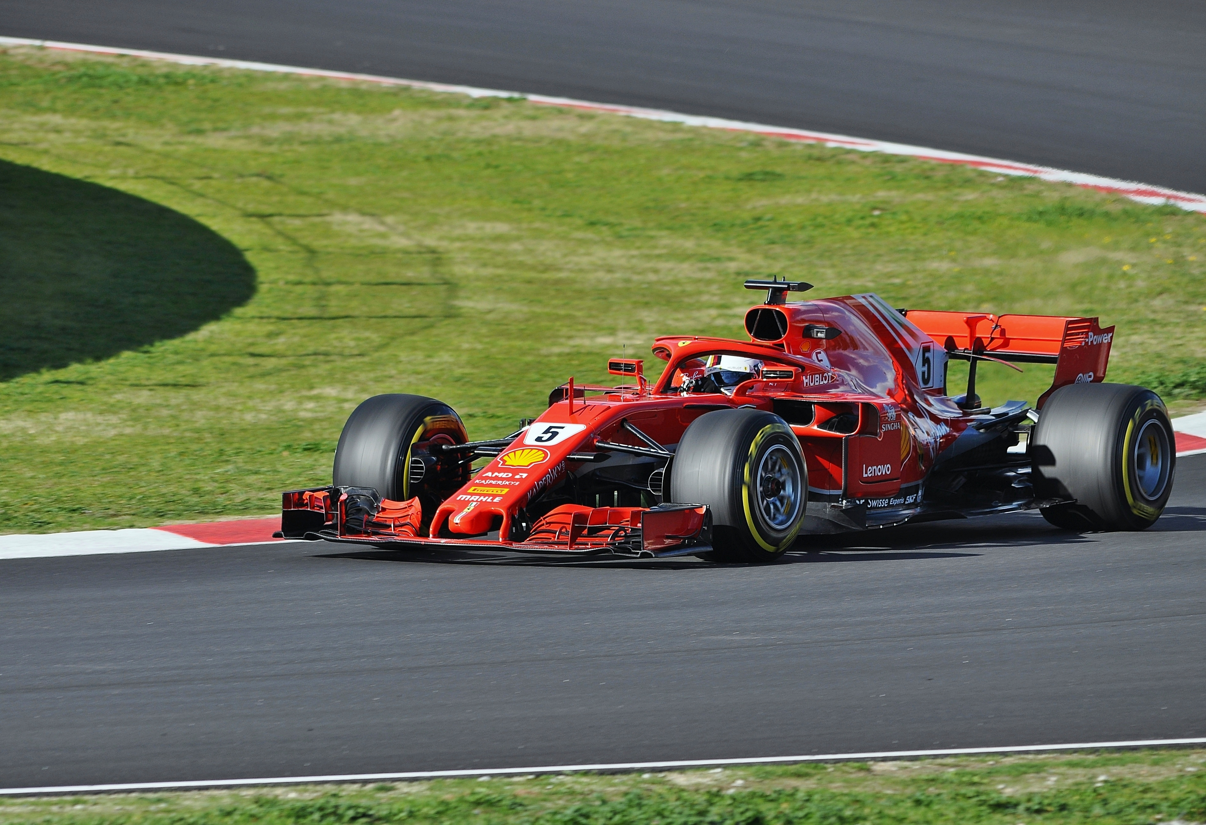 Ferrai SF71H-Circuit de Barcelona